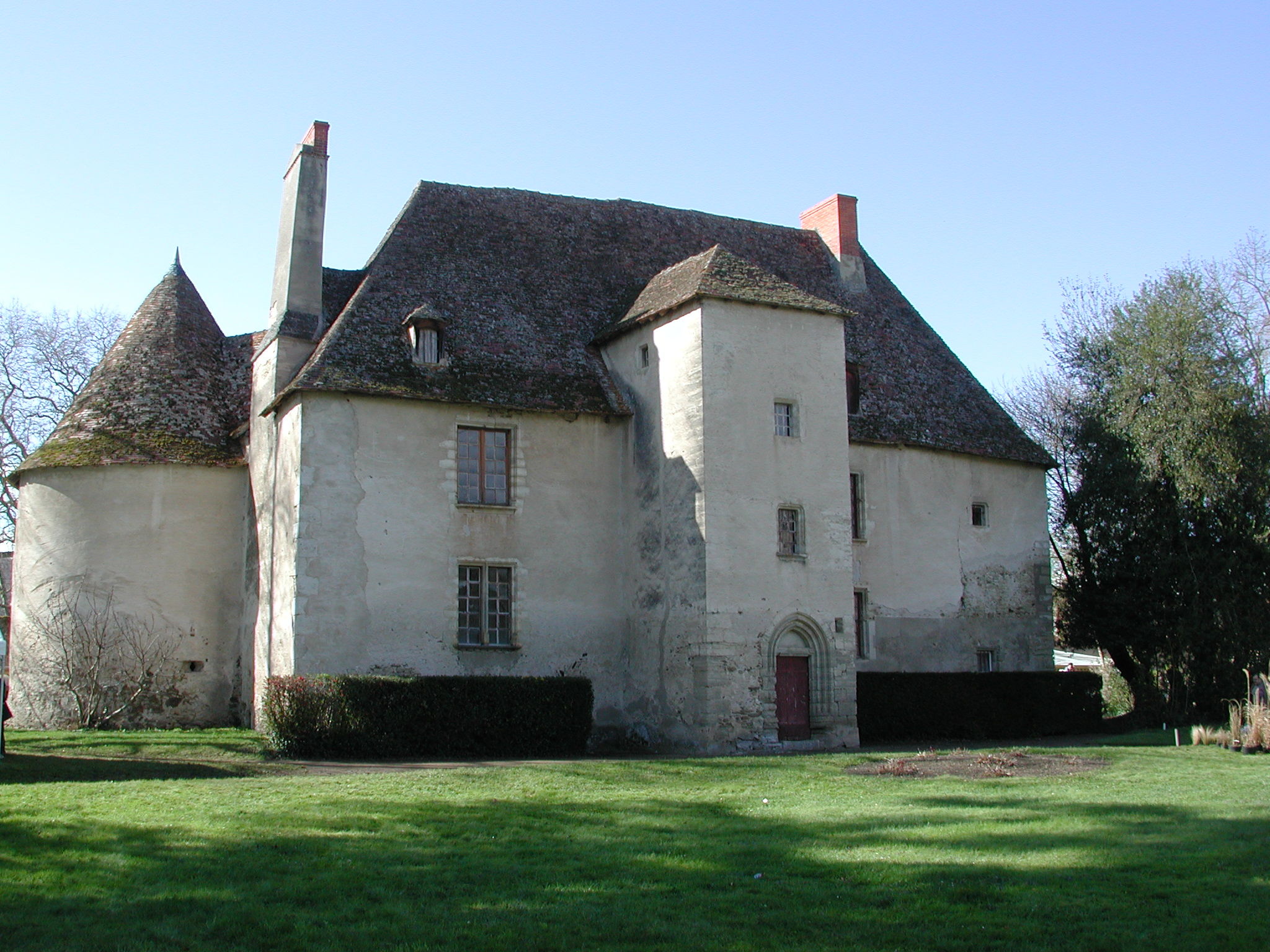 Jenzat (Allier, France). Le vieux château, remanié au XVe siècle. Façade est.